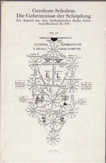 Scan des Artikelautors von eigenem Sammlungsgegenstand vom 3.2.2006 Titelzeichnung von Athanasius Kircher, † 1680 / Schutzdauer abgelaufen